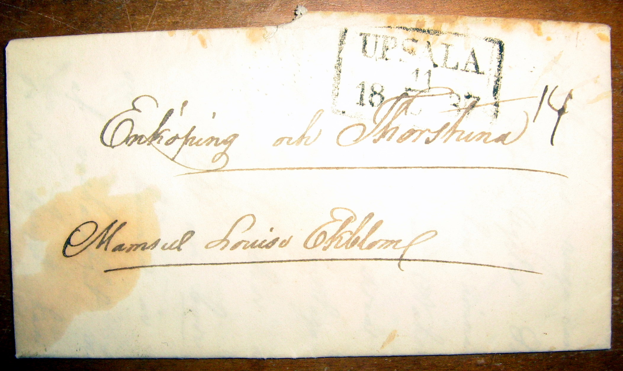 Förfilateli, brev stämplat i Uppsala 1837.